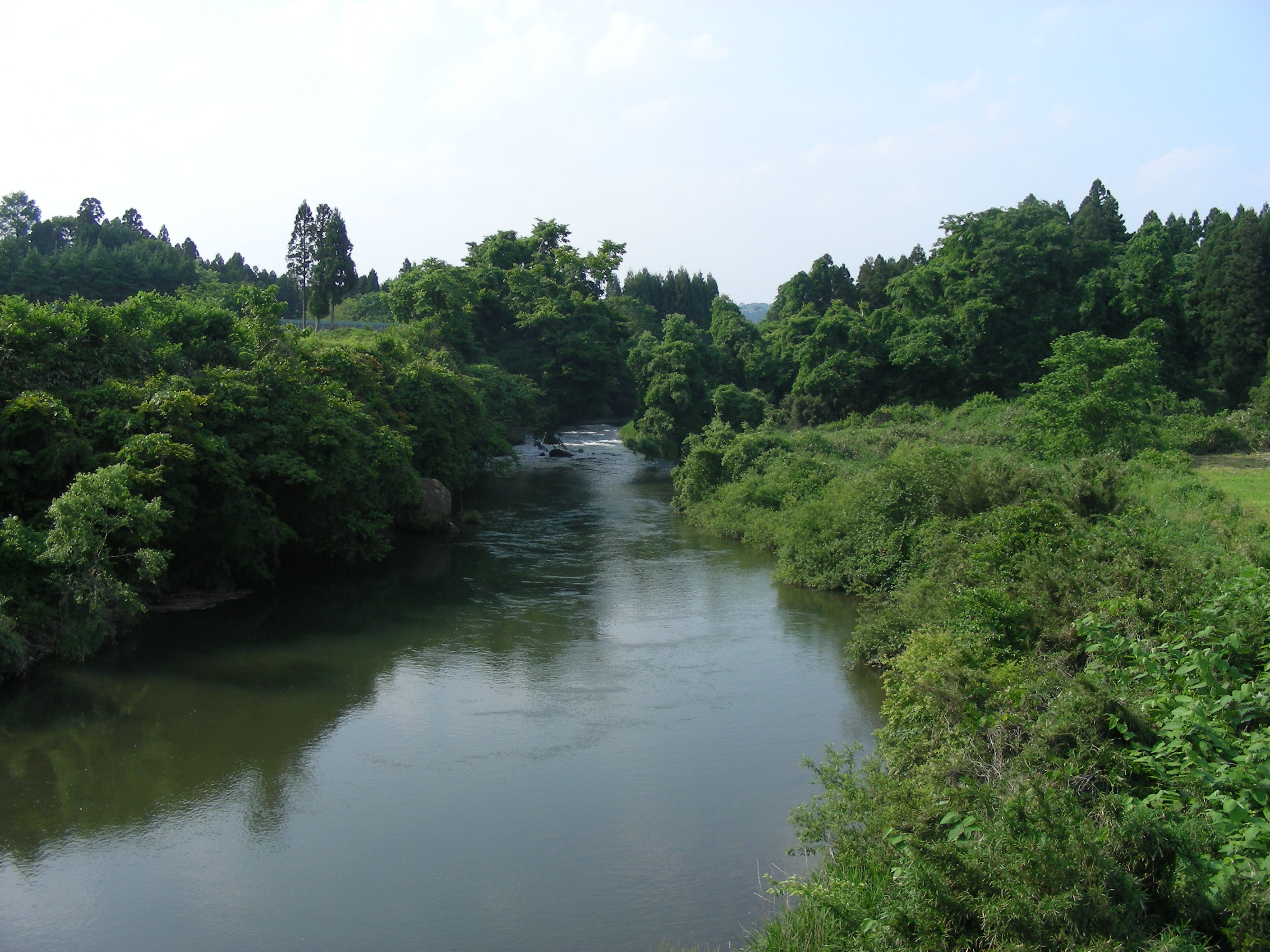 岩手県奥州市衣川区を流れる衣川。2008年6月9日撮影